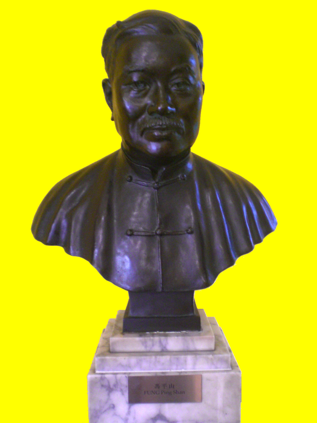 香港大學美術博物館, 馮平山塑像